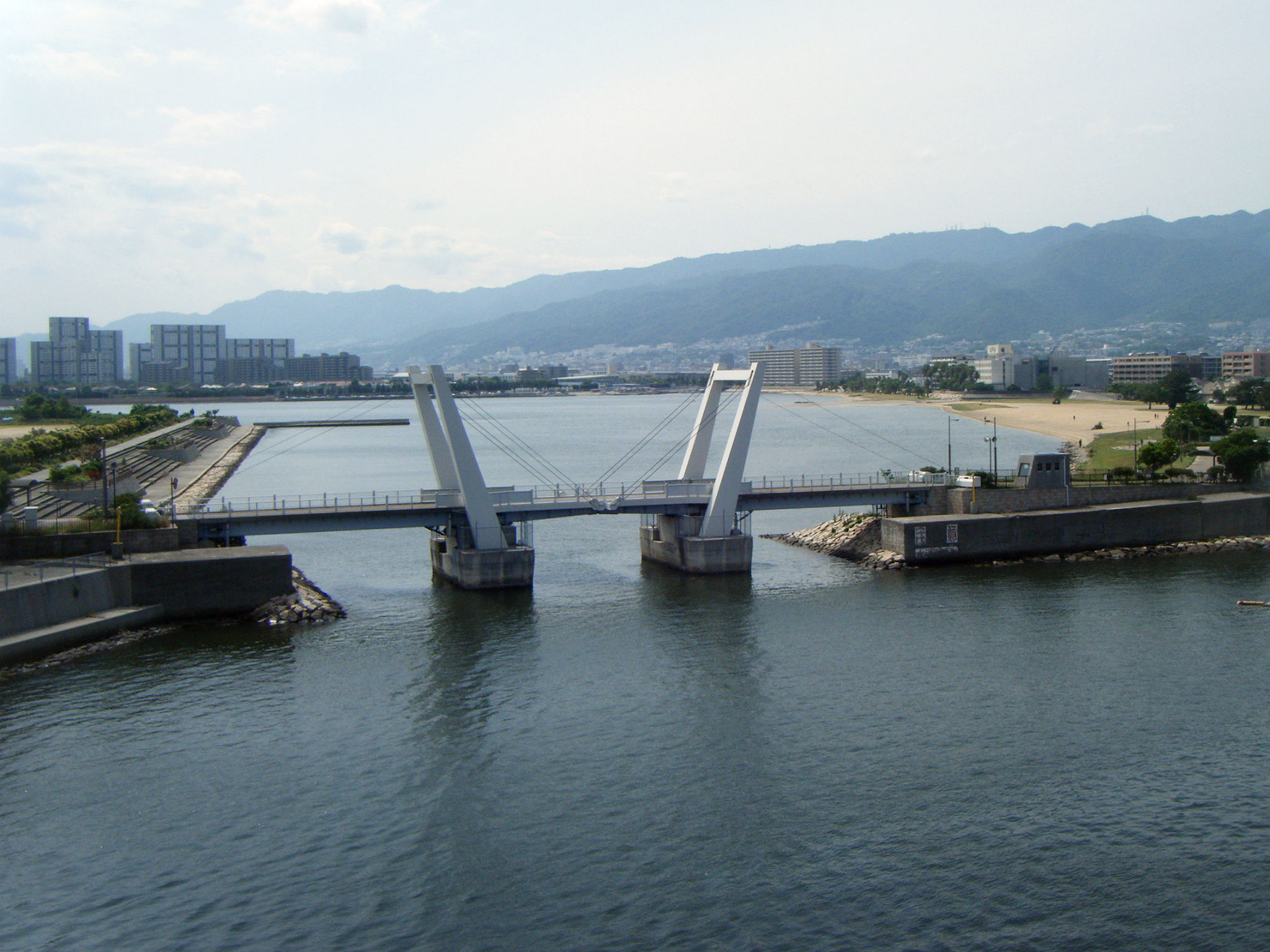 御前浜橋 西宮大橋より御前浜方面を望む